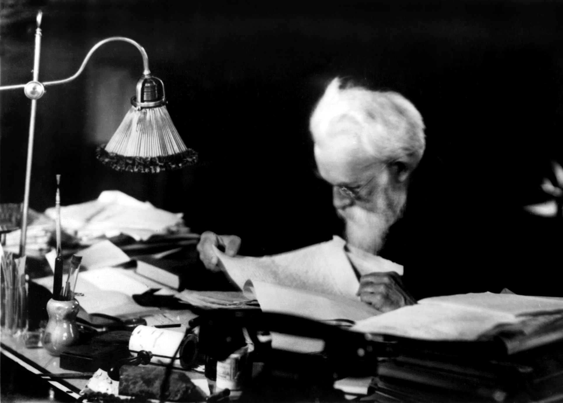 В. И. Вернадский